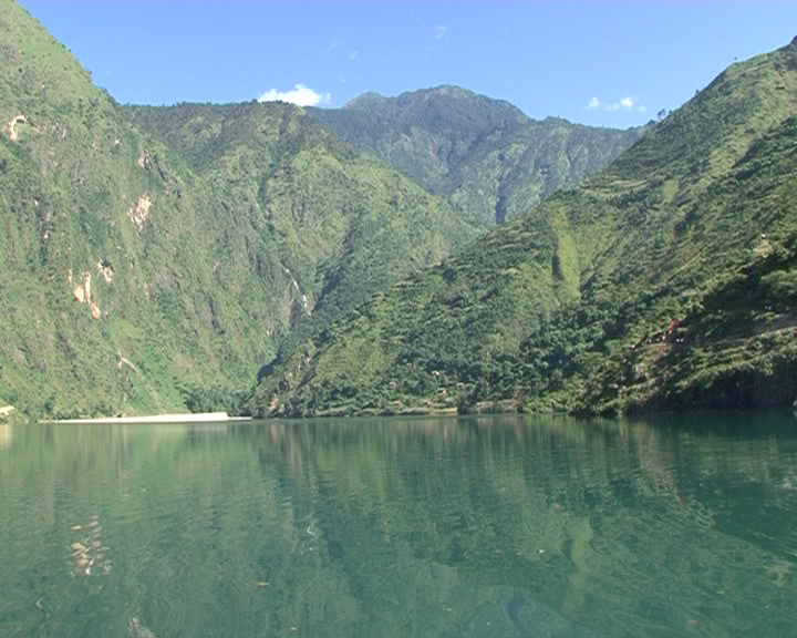 नेपाली: A lake in Rukum District, Nepal.